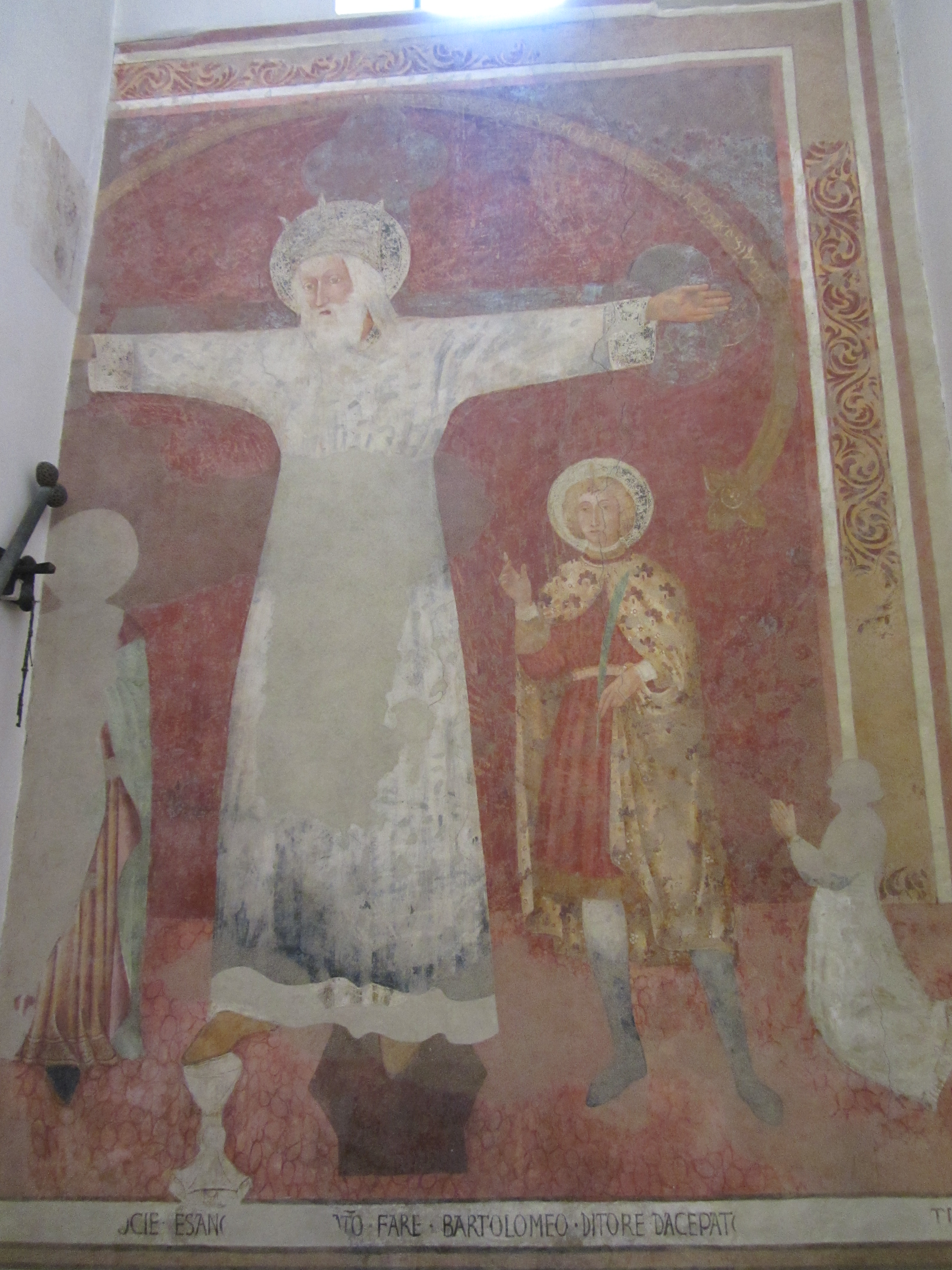 Anonimo, Volto Santo di Lucca, Parlascio, XV secolo